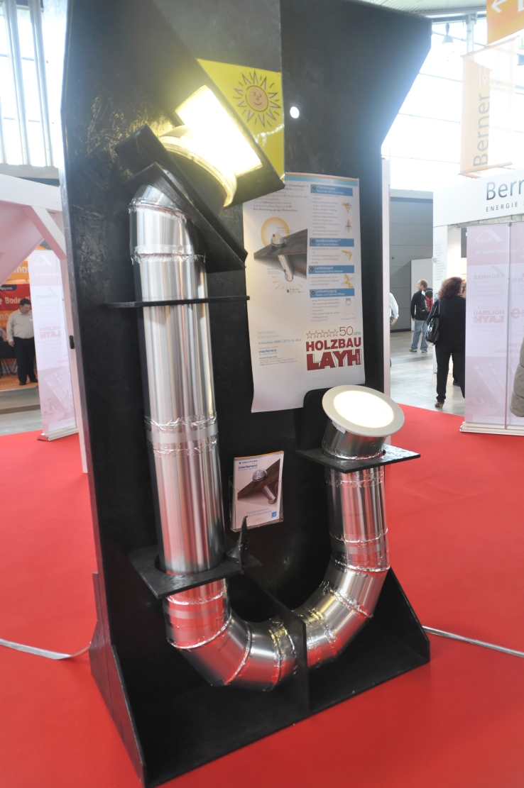 Messe HAUS HOLZ ENERGIE 2012 in Stuttgart Dieses Foto entstand durch Unterstützung des gemeinnützigen Vereins Skillshare.eu Skillshare e.V. ist ein eingetragener gemeinnütziger Verein zur Förderung der Bildung durch Unterstützung der Erstellung, Sammlung und Verbreitung so genannten freien Wissens. IBAN: DE16 8306 5408 0004 8850 66 BIC: GENODEF1SLR Bank: VR-Bank Altenburger Land